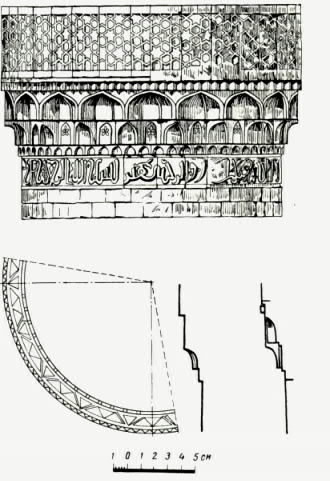 Sınıqqala məscidinin minarəsi